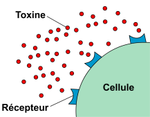 Schéma de toxines bactériennes près d'une cellule. Auteur : Yohan Source : Crée avec un logiciel de dessin vectoriel